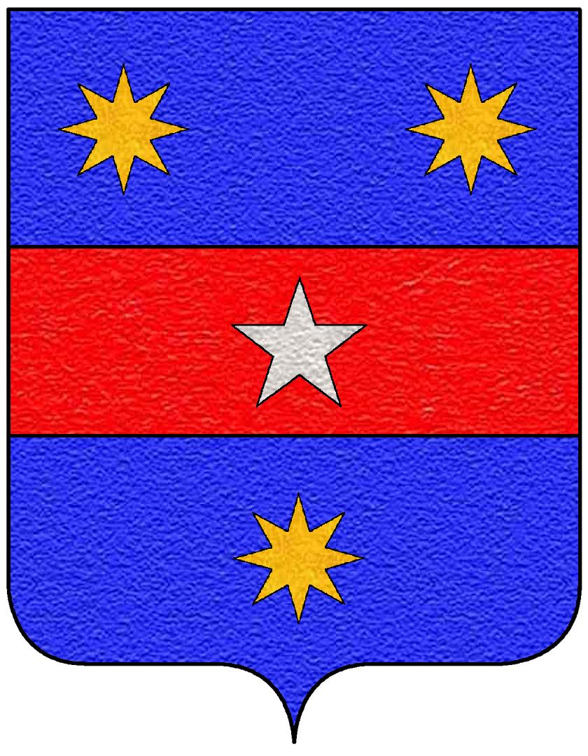 Stemma della famiglia Antonelli